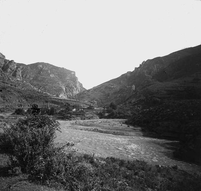 Monestir de Sant Andreu de Tresponts. Josep Salvany i Blanch (1923)